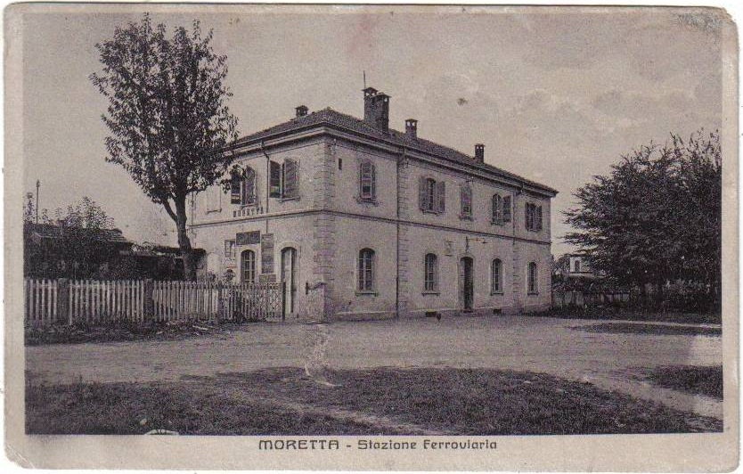 Stazione ferroviaria di Moretta in una cartolina d'epoca.